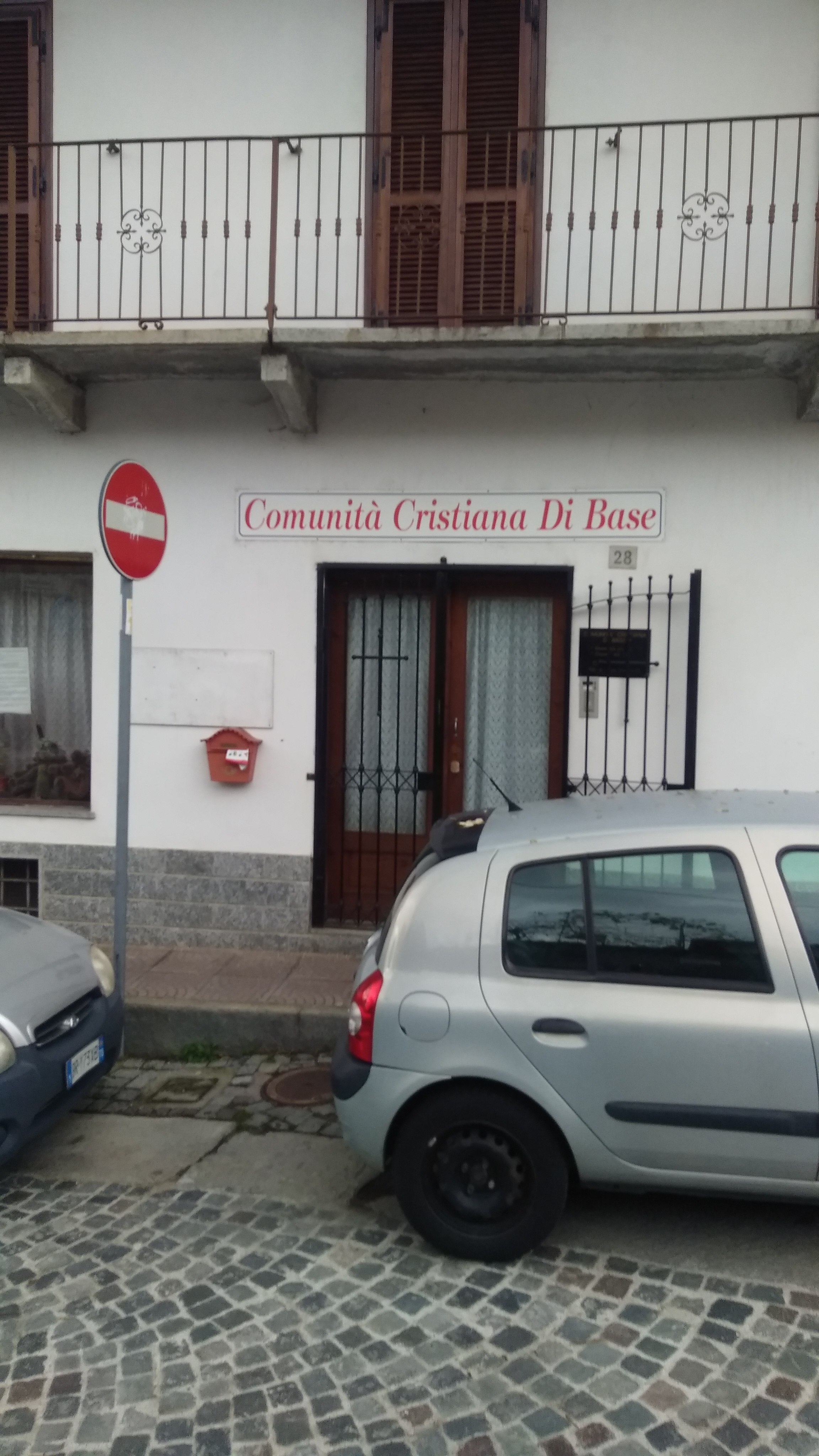 Alpignano la sede della comunità cristiana di base